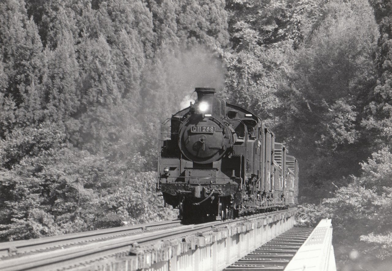 只見駅方面へ運行中のC11 289号機。会津若松機関区所属、1974年廃車。会津西方駅付近にて。